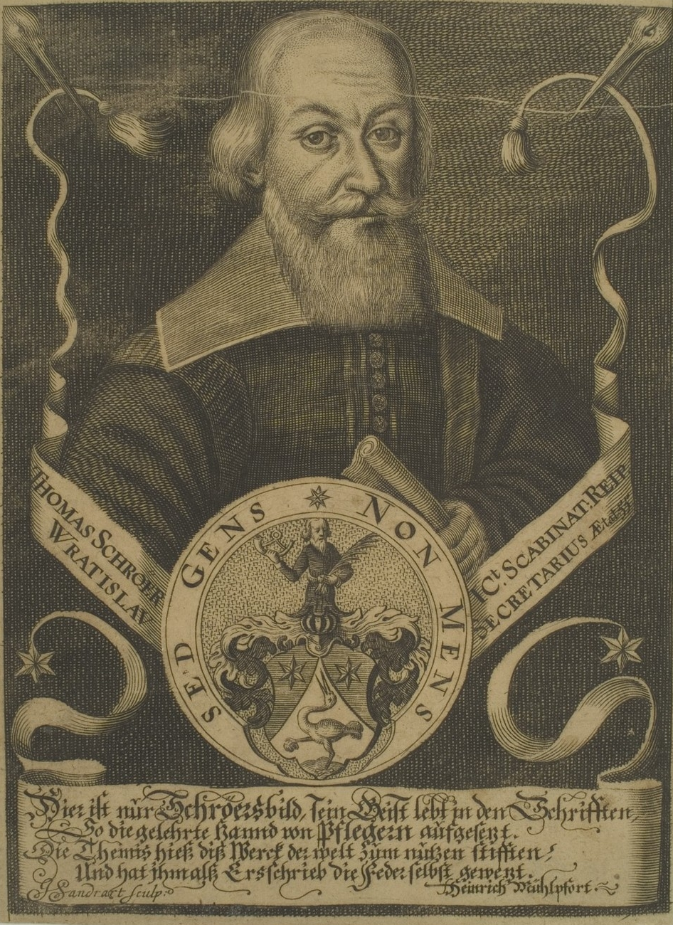 Thomas von Schröer. Gezeichnet von Jakob von Sandrart.